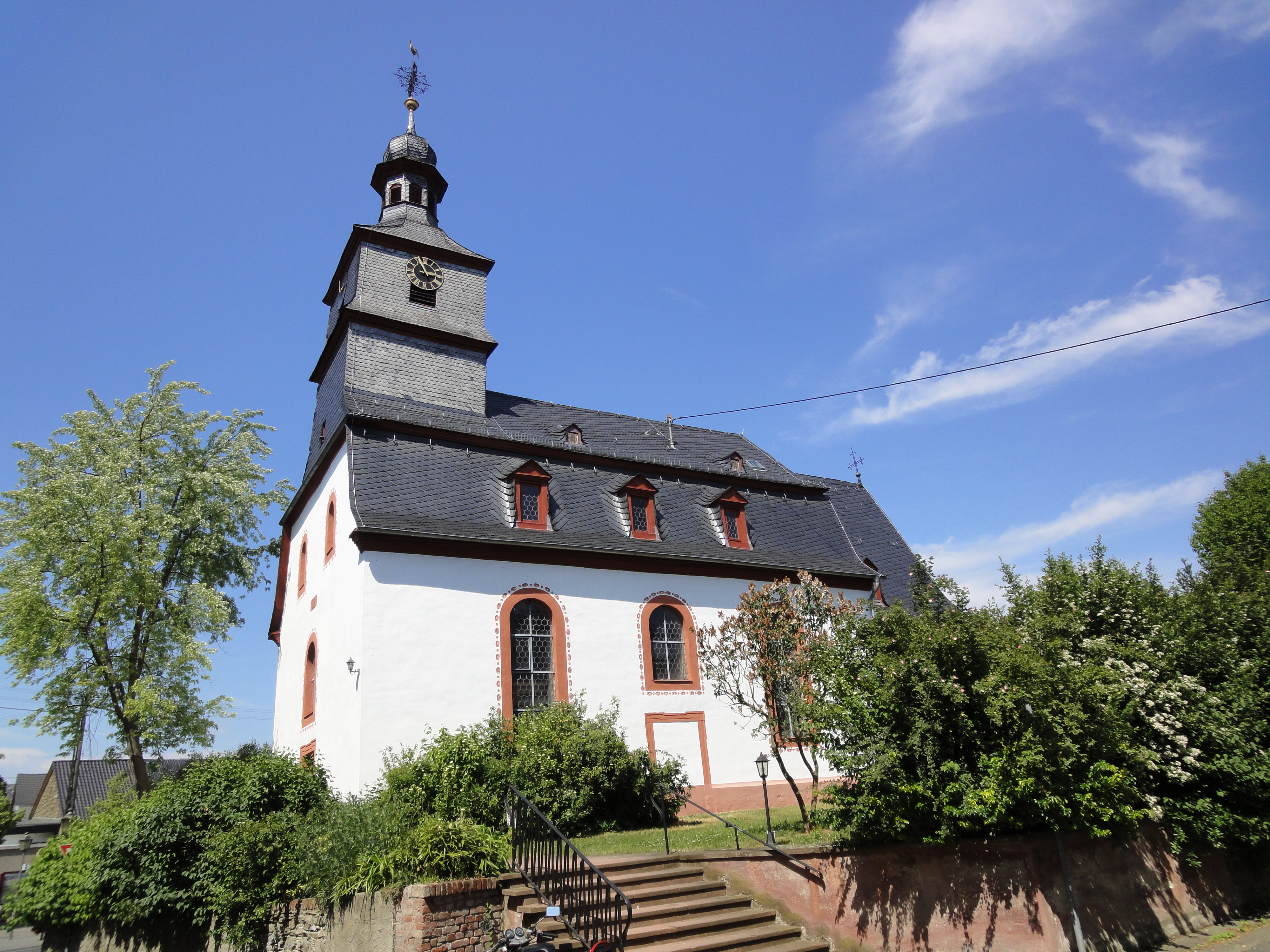 Die Kirche in Idstein Wörsdorf